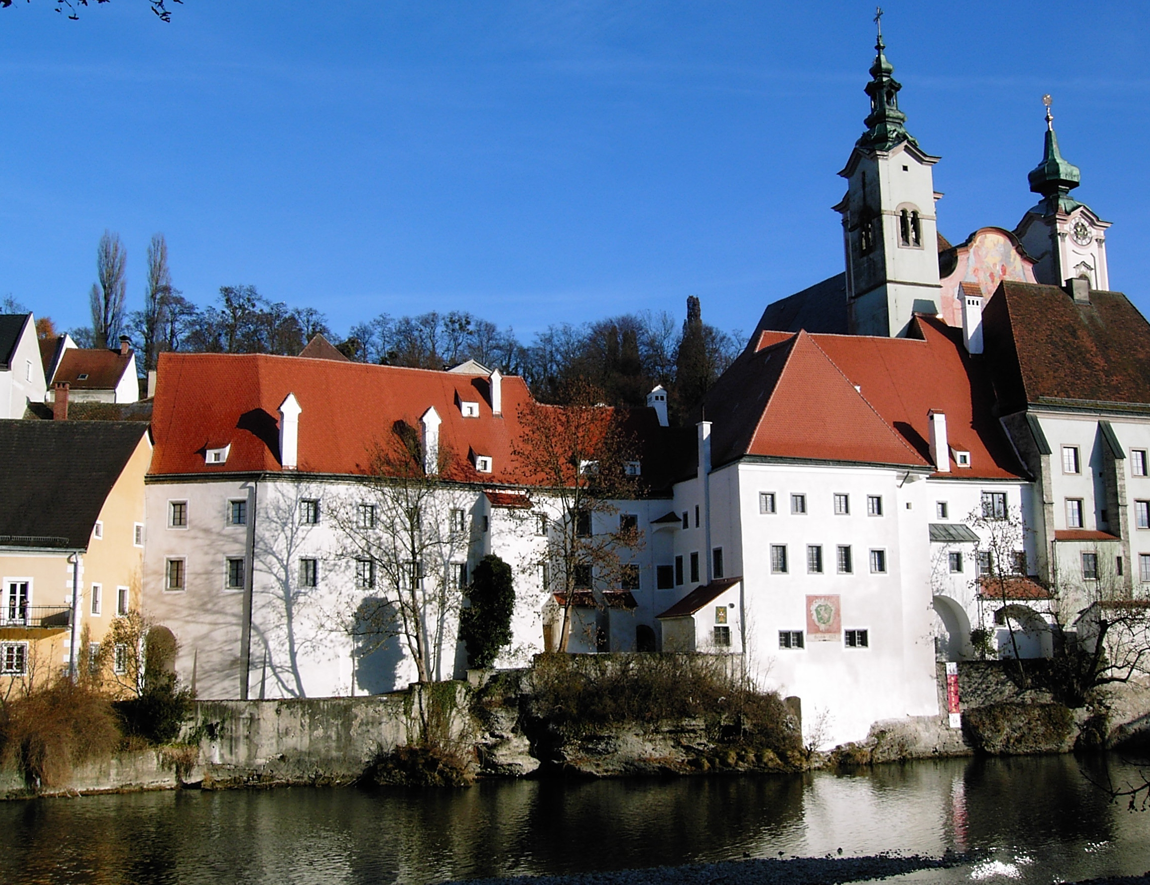 Steyr Michaelerplatz 2, Teil des ehemaligen Bürgerspitales, flussseitige Ansicht